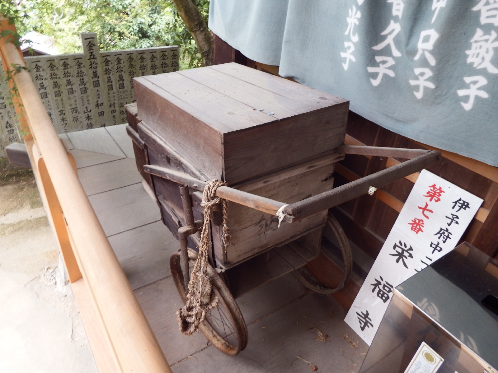 栄福寺のいざり車